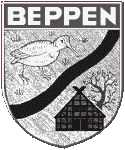 Ehemaliges Wappen der Gemeinde Beppen